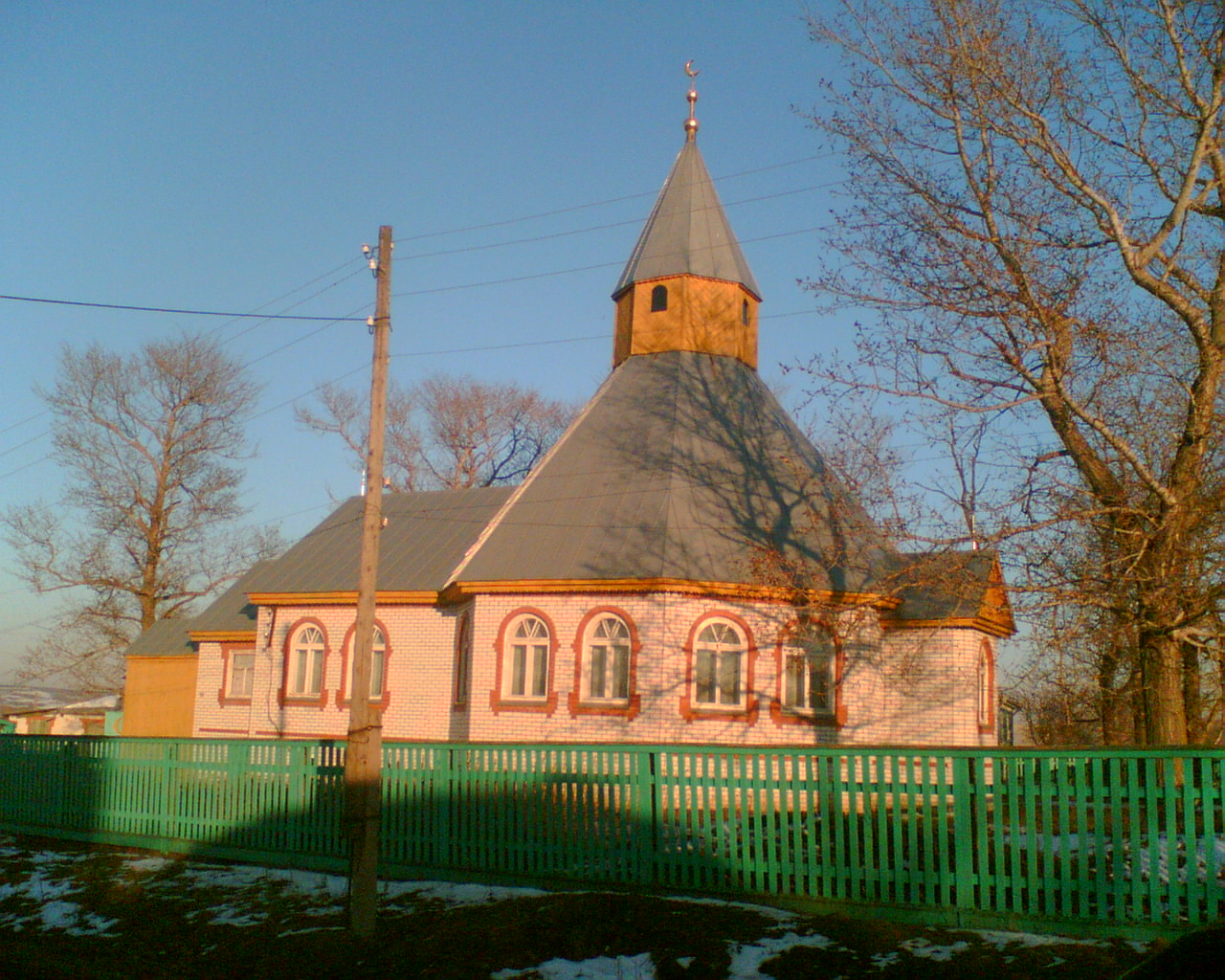 Мечеть: Ендовищи, Краснооктябрьский район, Нижегородская область